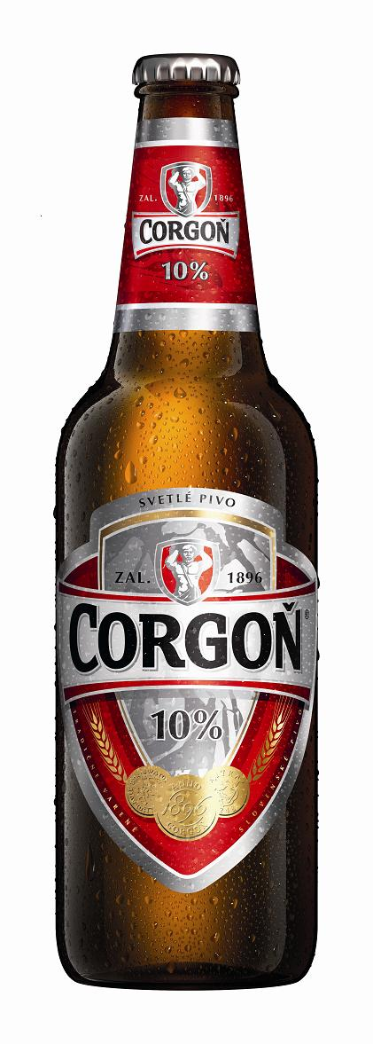 Corgoň 10%